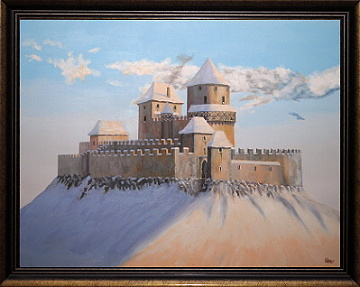 Hrad Egerberk, olej na plátně 94x72 cm